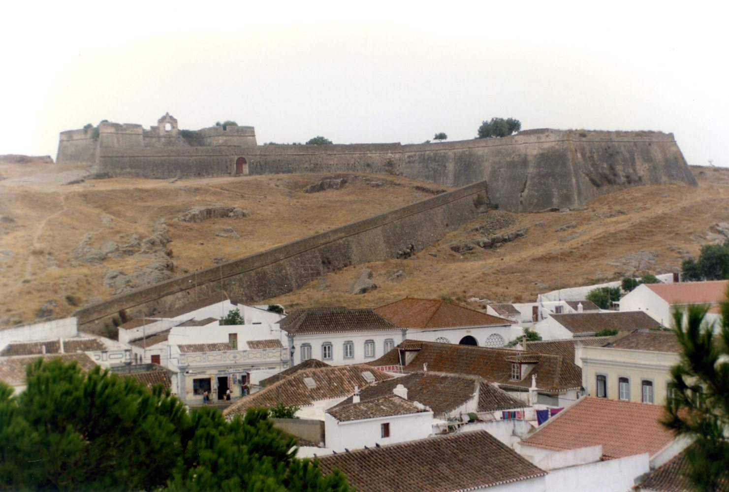 Castelo de Castro Marim This file was uploaded for Wiki Loves Monuments in Portugal with the unique identifier 70377.